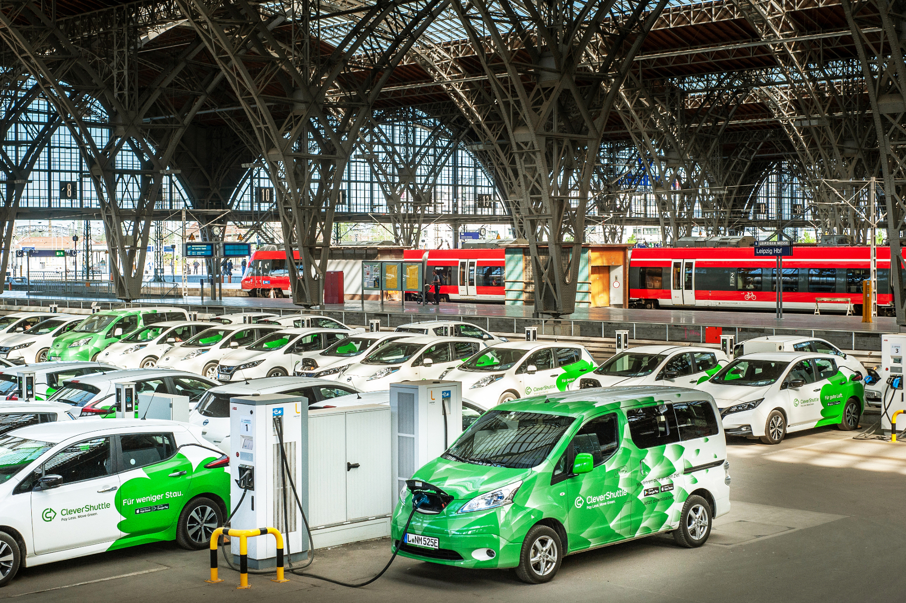 Ladehof von CleverShuttle am Bahnhof Leipzig